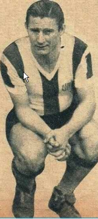 Raúl Altuve